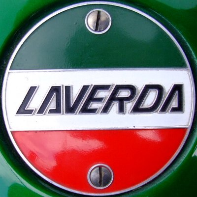 Logo della Laverda 1000 3C del 1974